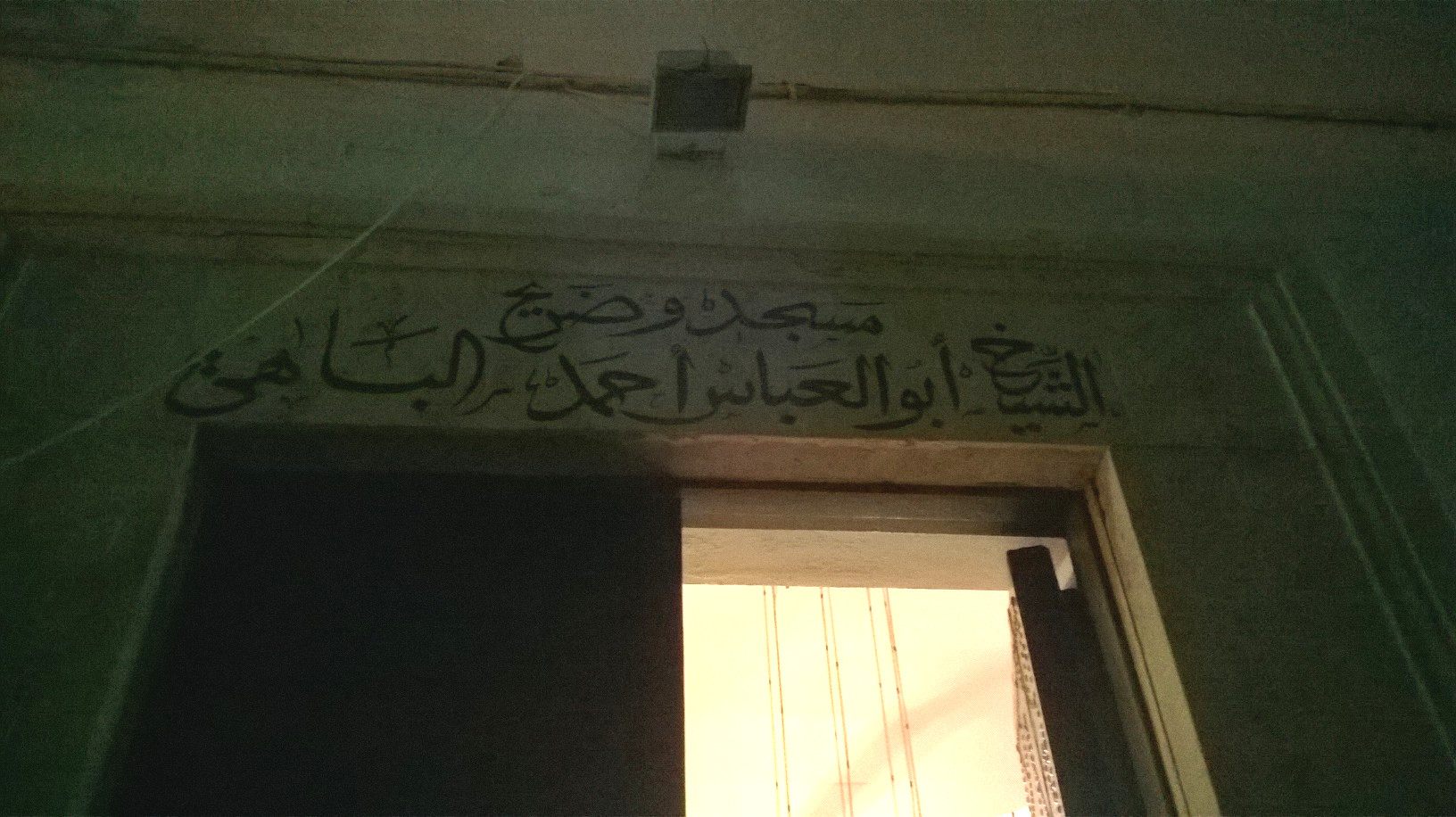 Sidi Alaoui, Bab Lakwes , Tunis